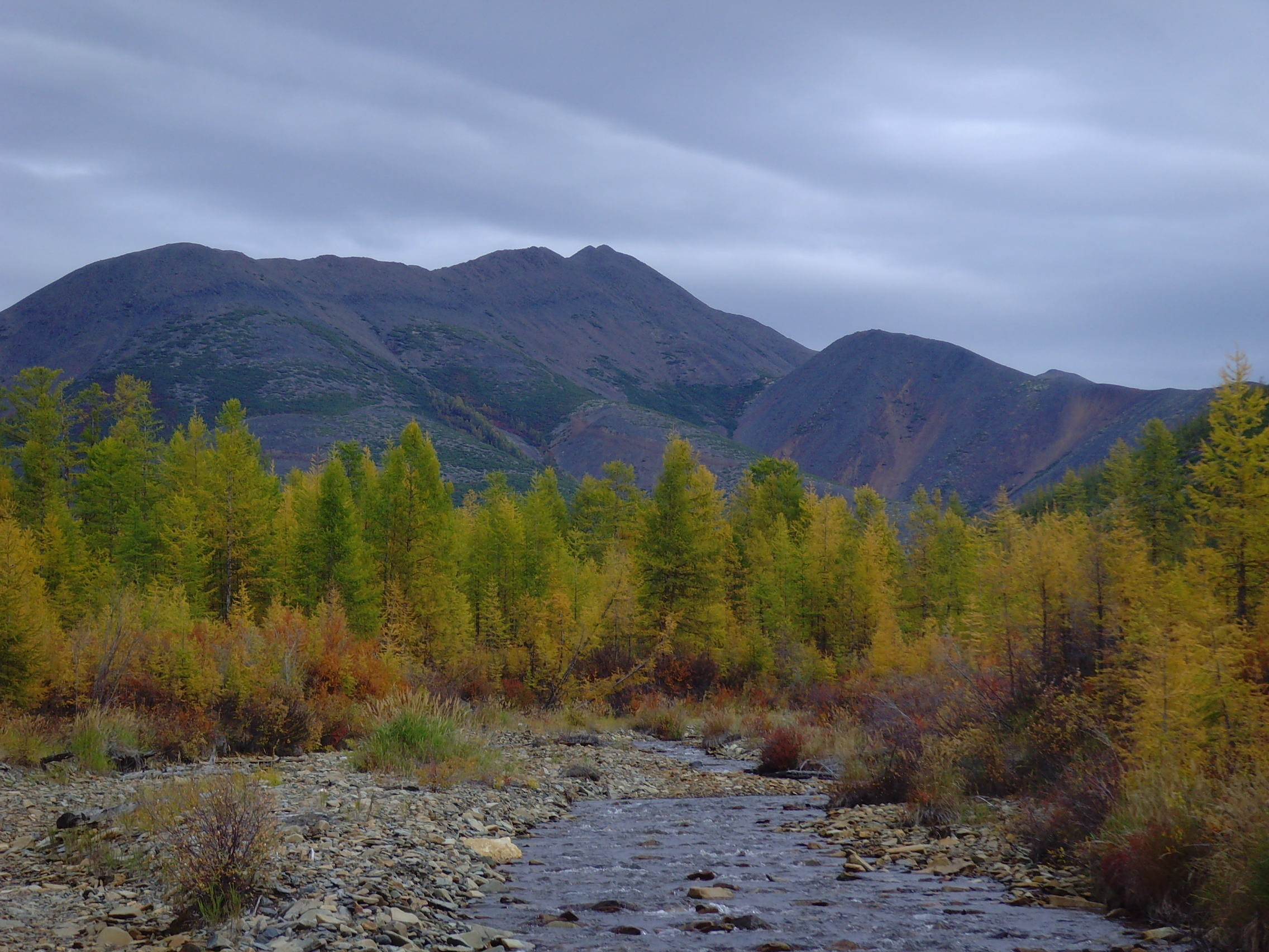 Осень наступает